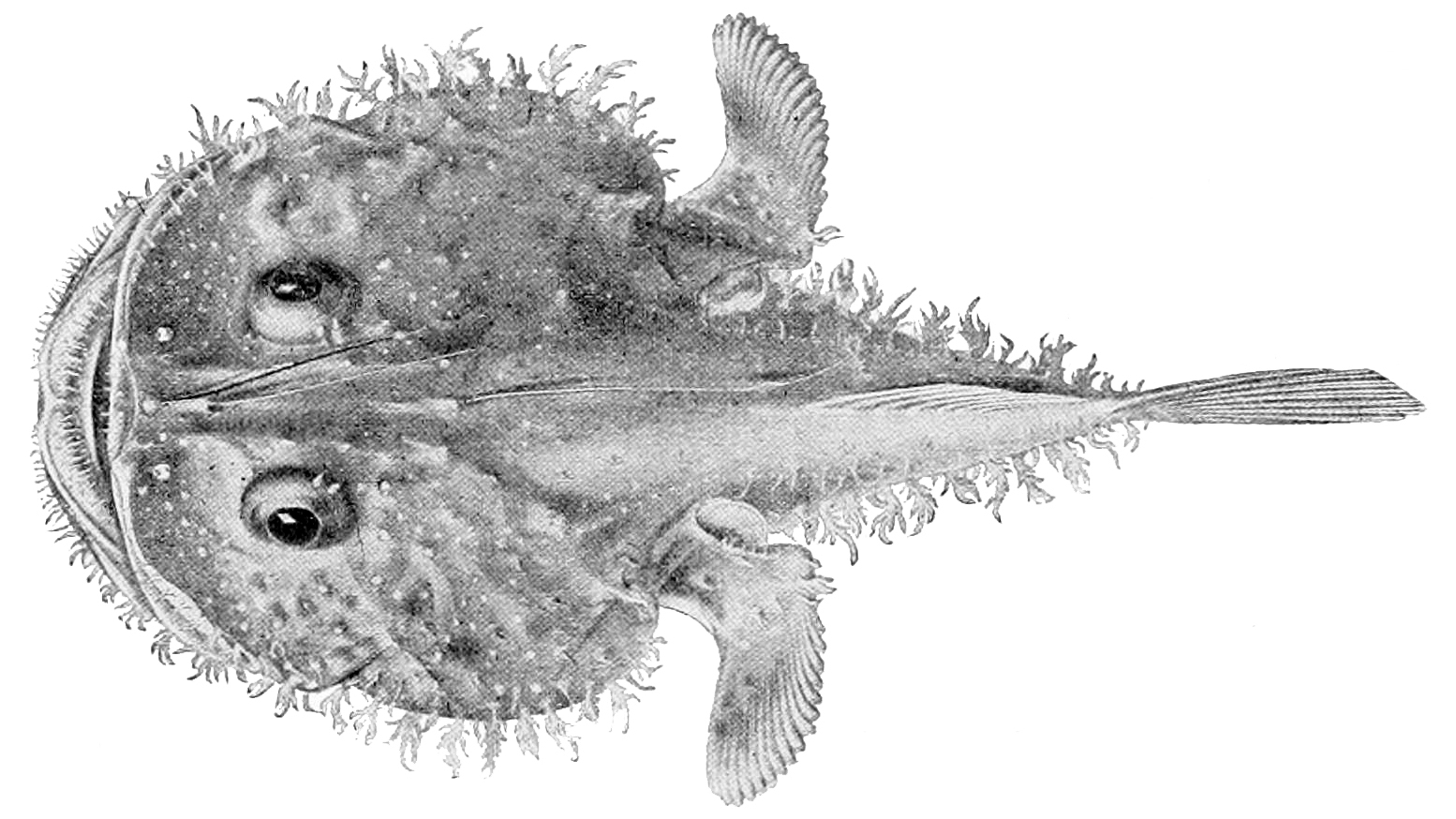 Lophiodes miacanthus